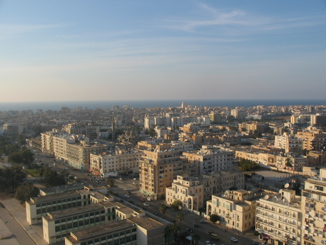 Bengasi visto dall'Hotel Tibesti